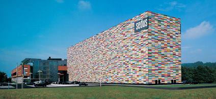 Hochregallager der Sedus Stoll AG Waldshut in Dogern